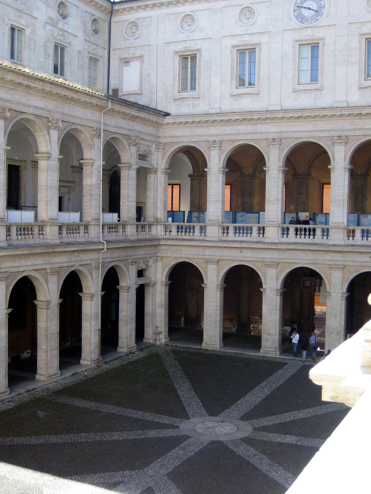 sapienza courtyard